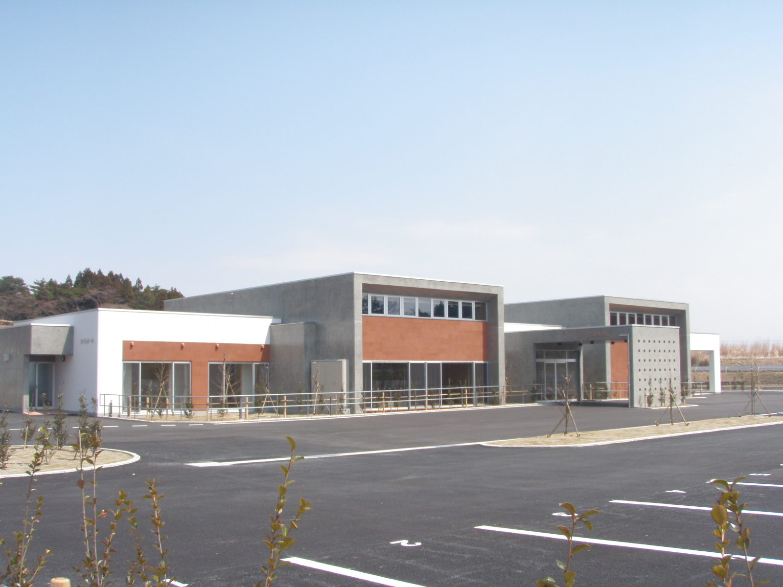 宮城県登米市迫町新田字上葉ノ木沢1-1